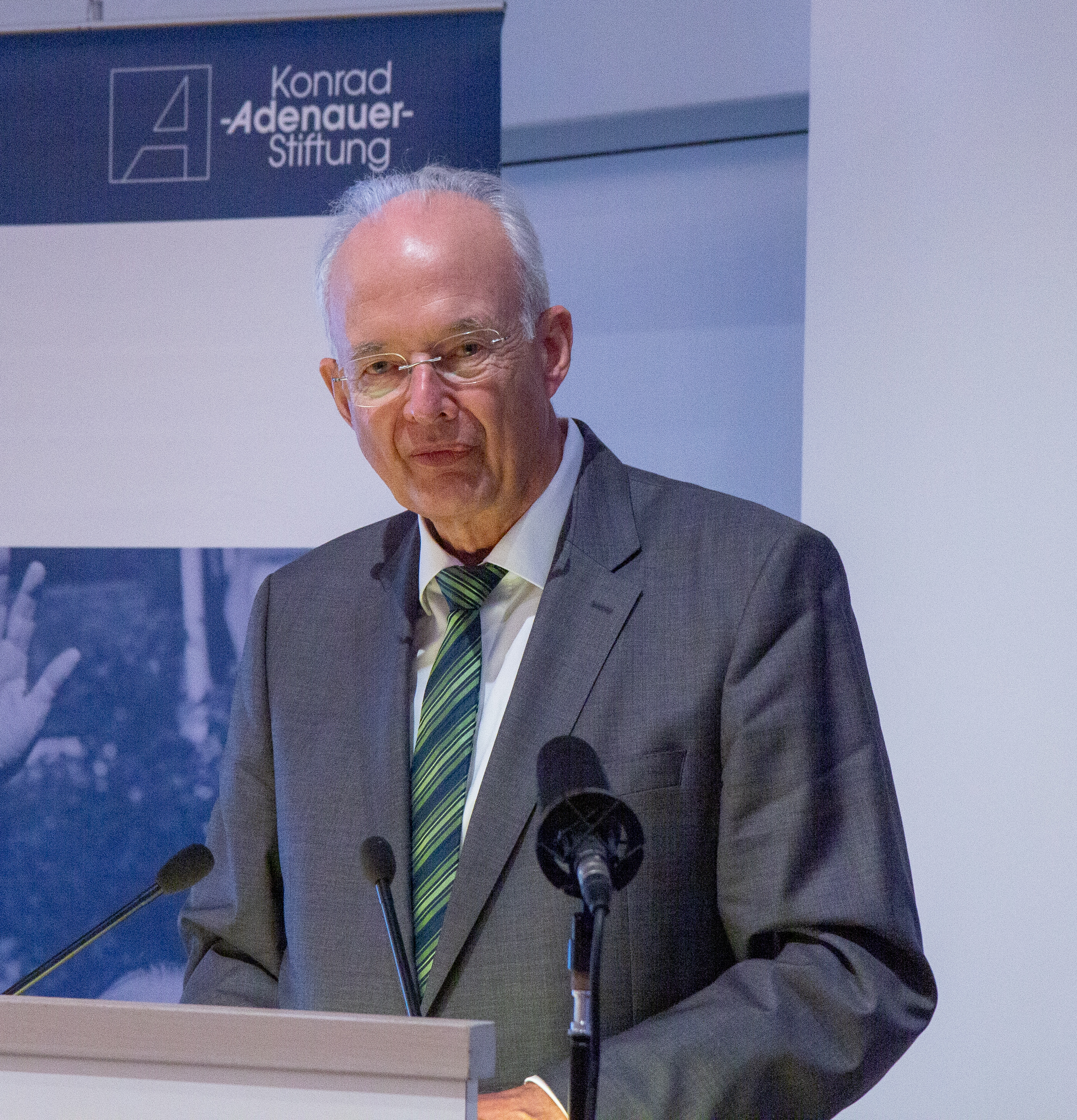 Vorstellung des Buches "Ohne Familie ist kein Staat zu machen" im Erbacher Hof in Mainz u.a. mit Paul Kirchhof, Sylvia Pantel, Christian Baldauf, Bischof Peter Kohlgraf, Prof. Jürgen Borchert, Mechthild Loehr und Karl-Heinz van Lier.